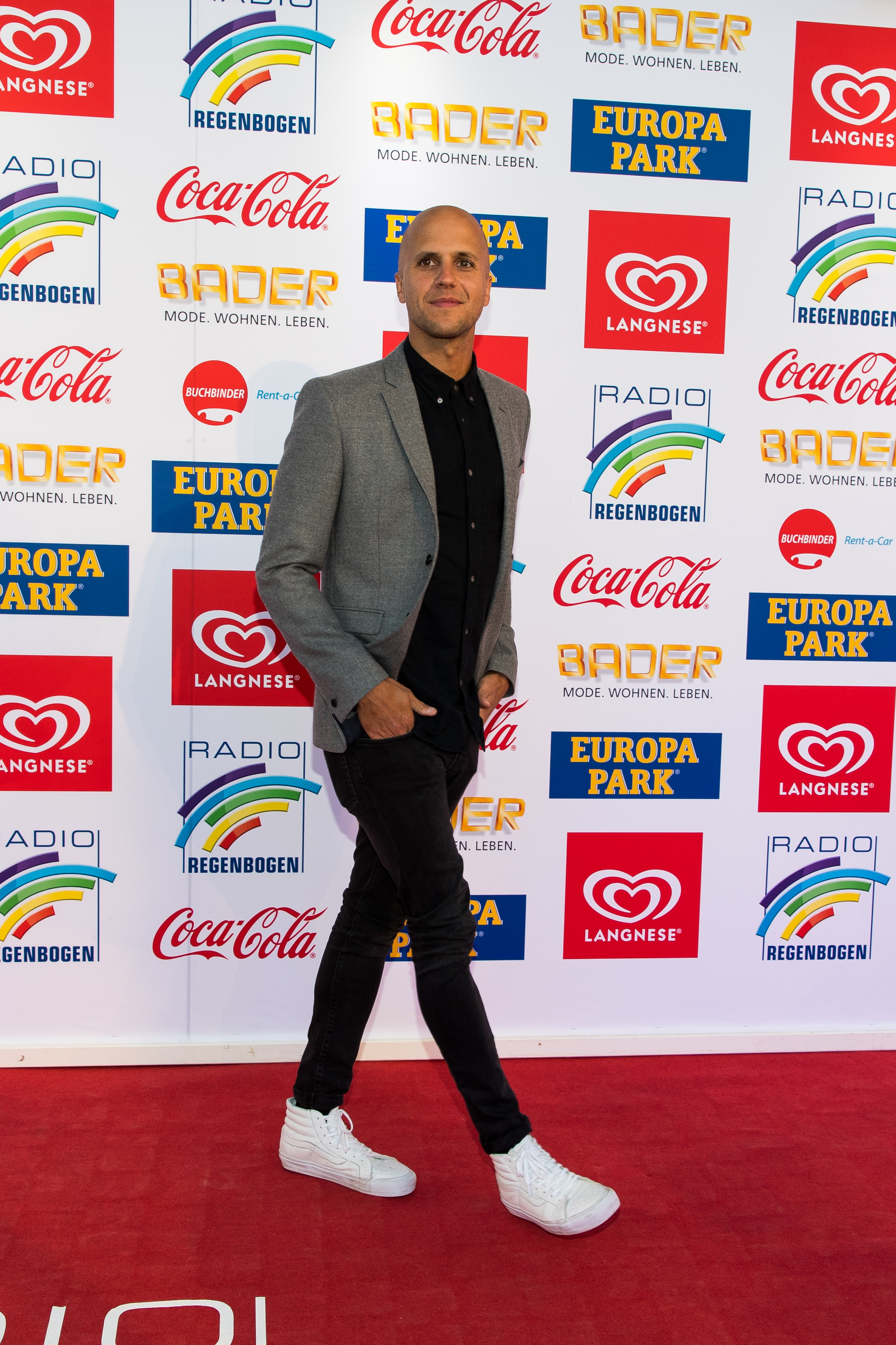 during Radio Regenbogen Award 2017 at Europapark, Rust, Baden-Württemberg, Germany on 2017-04-07, Photo: Sven Mandel